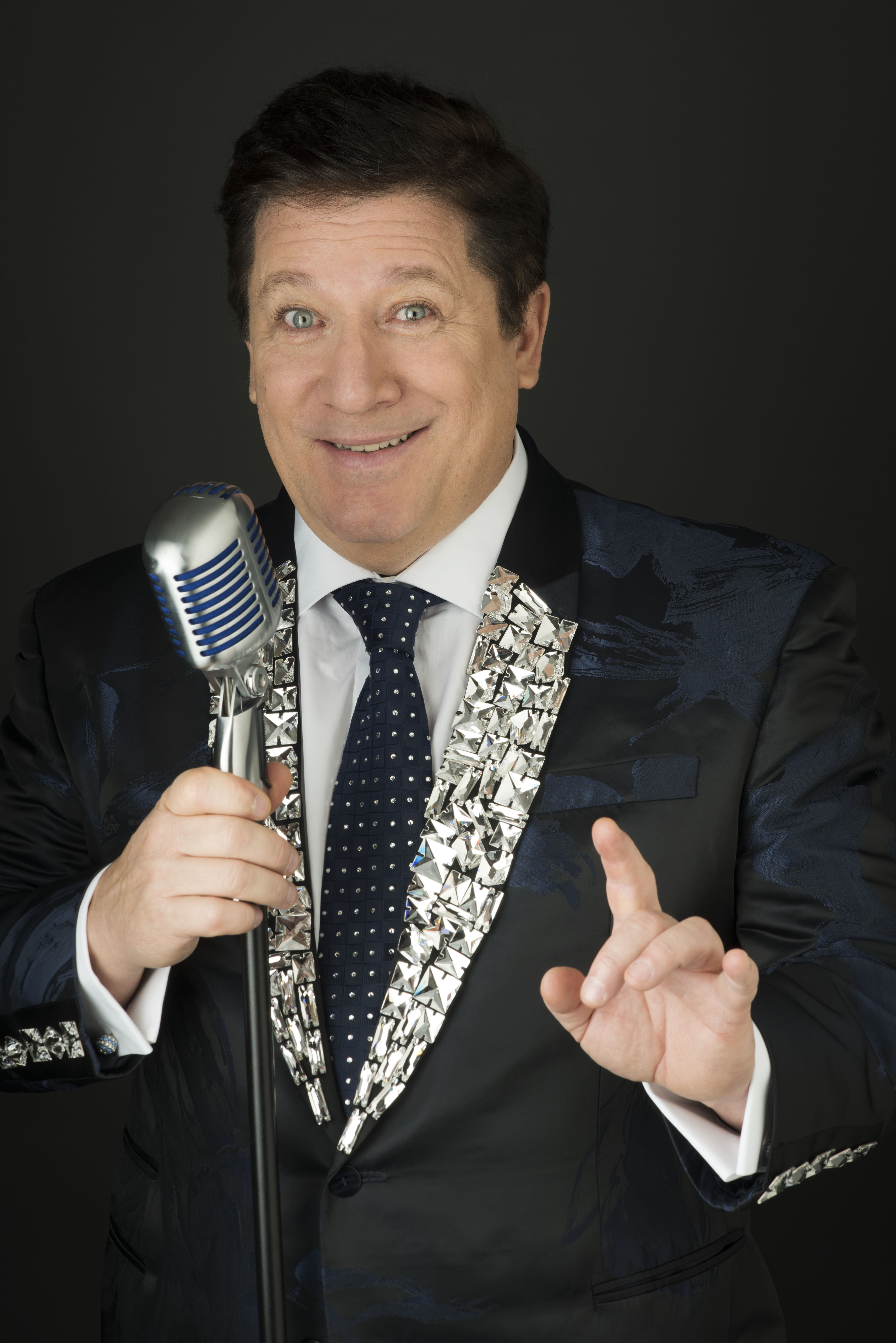 Foto do site